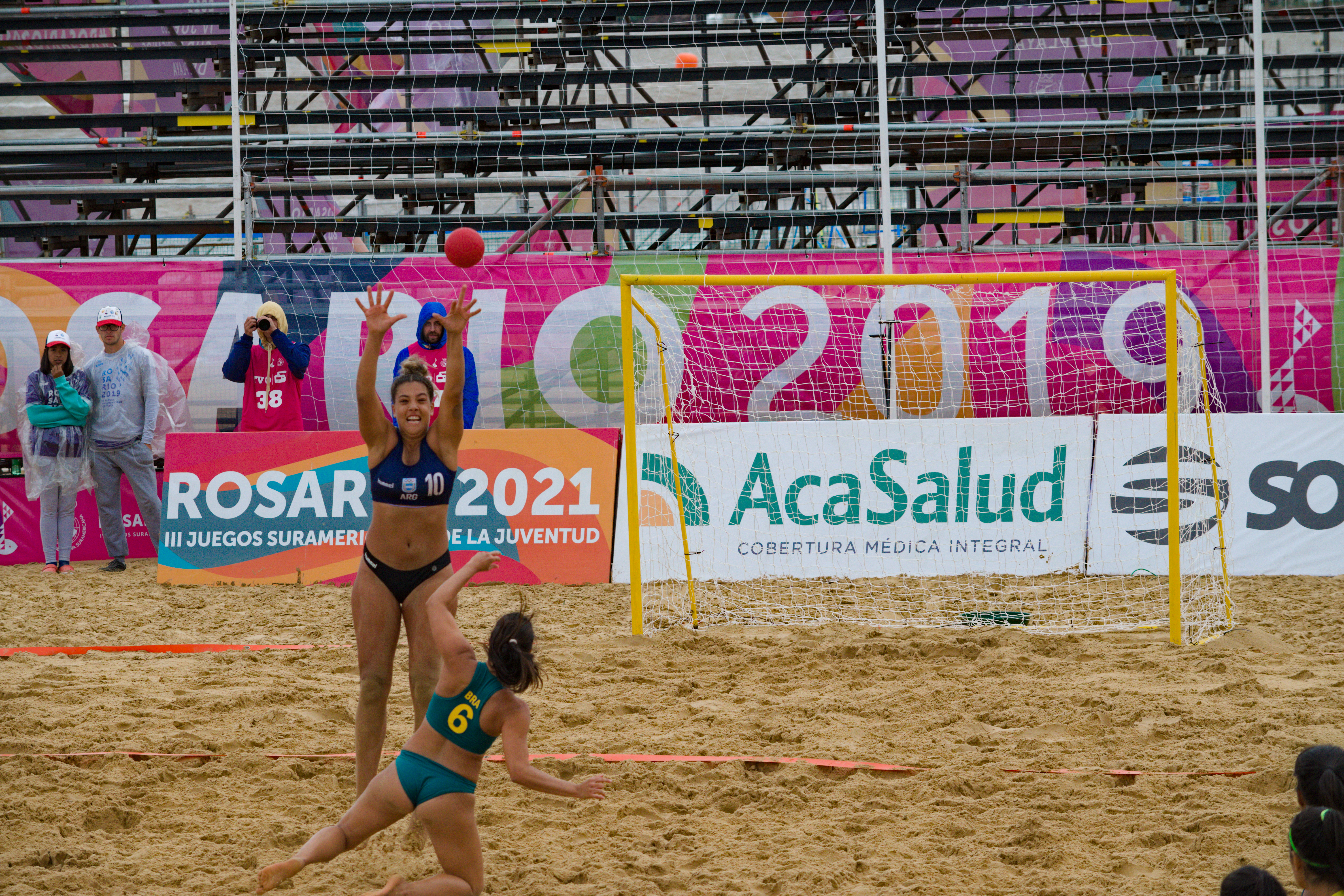 Partido por la final femenina de handball entre Argentina y Brasil en los Juegos Suramericanos de Playa 2019